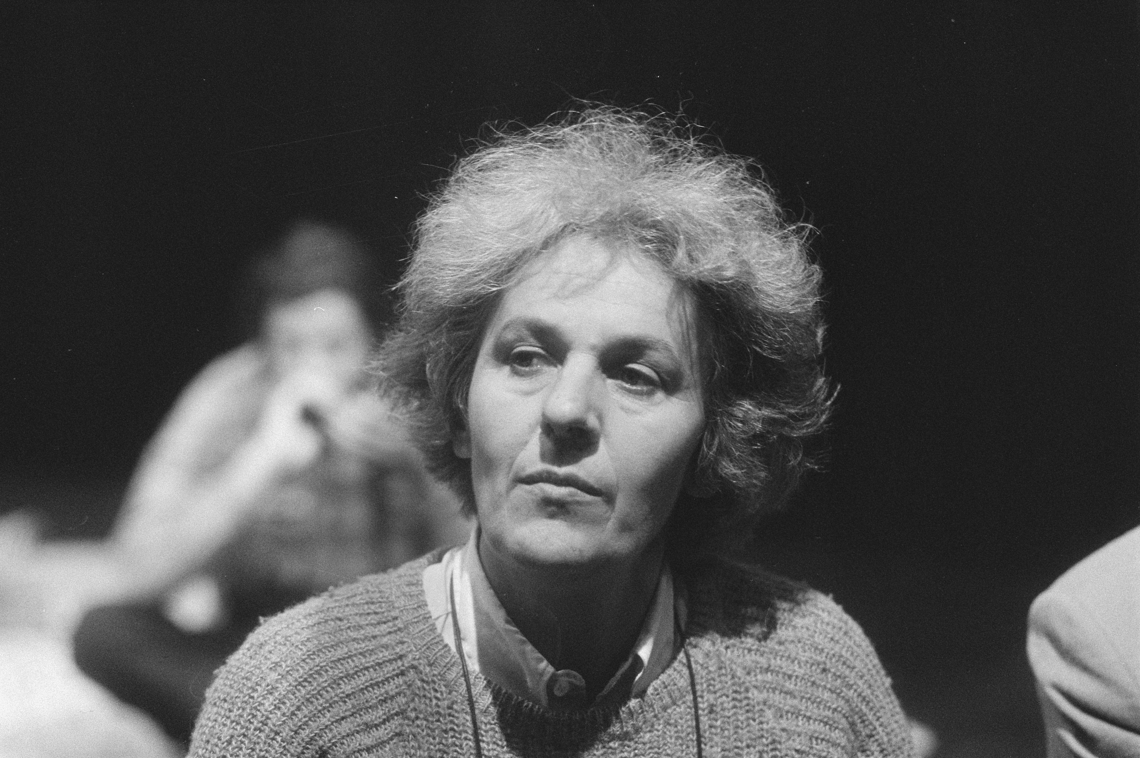 Ariane Mnouchkine , réalisatrice, lors d'une conférence de presse pour le Theatre du Soleil, à Amsterdam, le 6 juin 1986